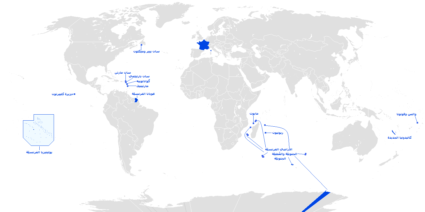 أقاليم ما وراء البحار الفرنسيَّة.